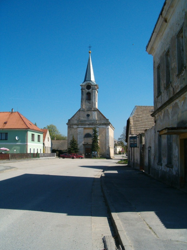 Hůrky - kostel sv. Jakuba